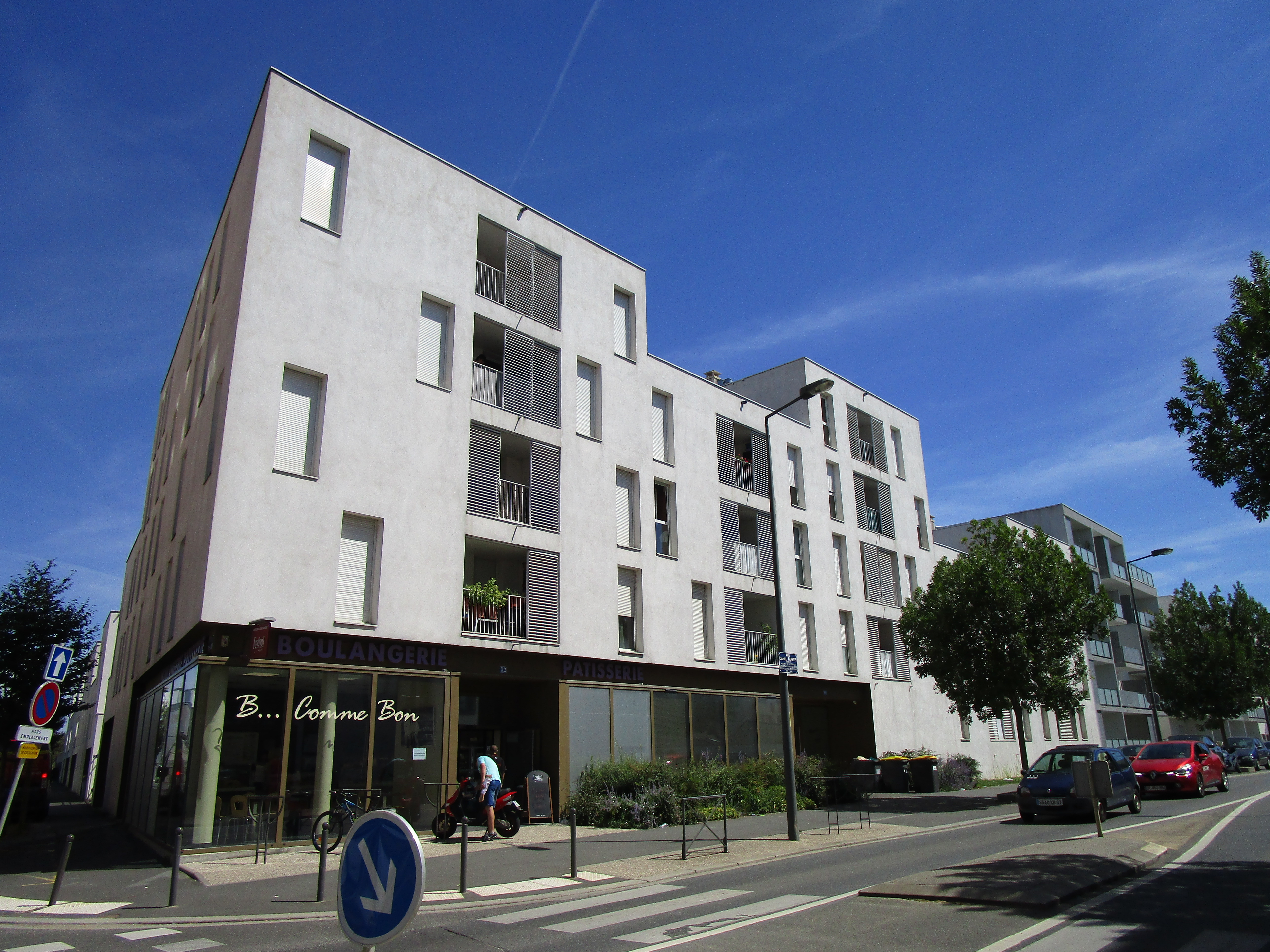 Résidence Le Petit Beauséjour au sein du quartier Monconseil, à Tours Nord. Intersection entre la rue Daniel Mayer et la rue François Giroud